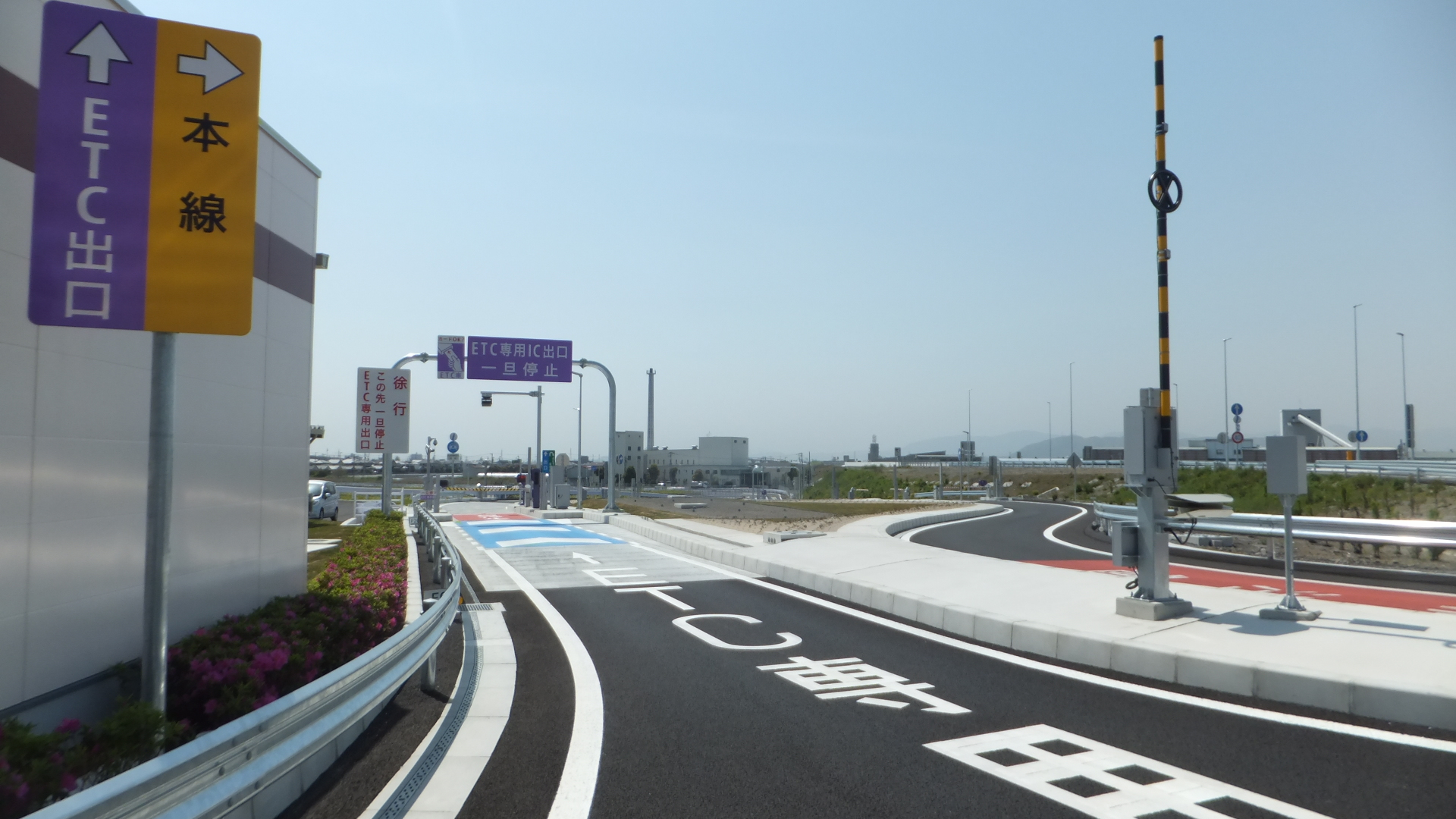 松茂スマートインターチェンジ